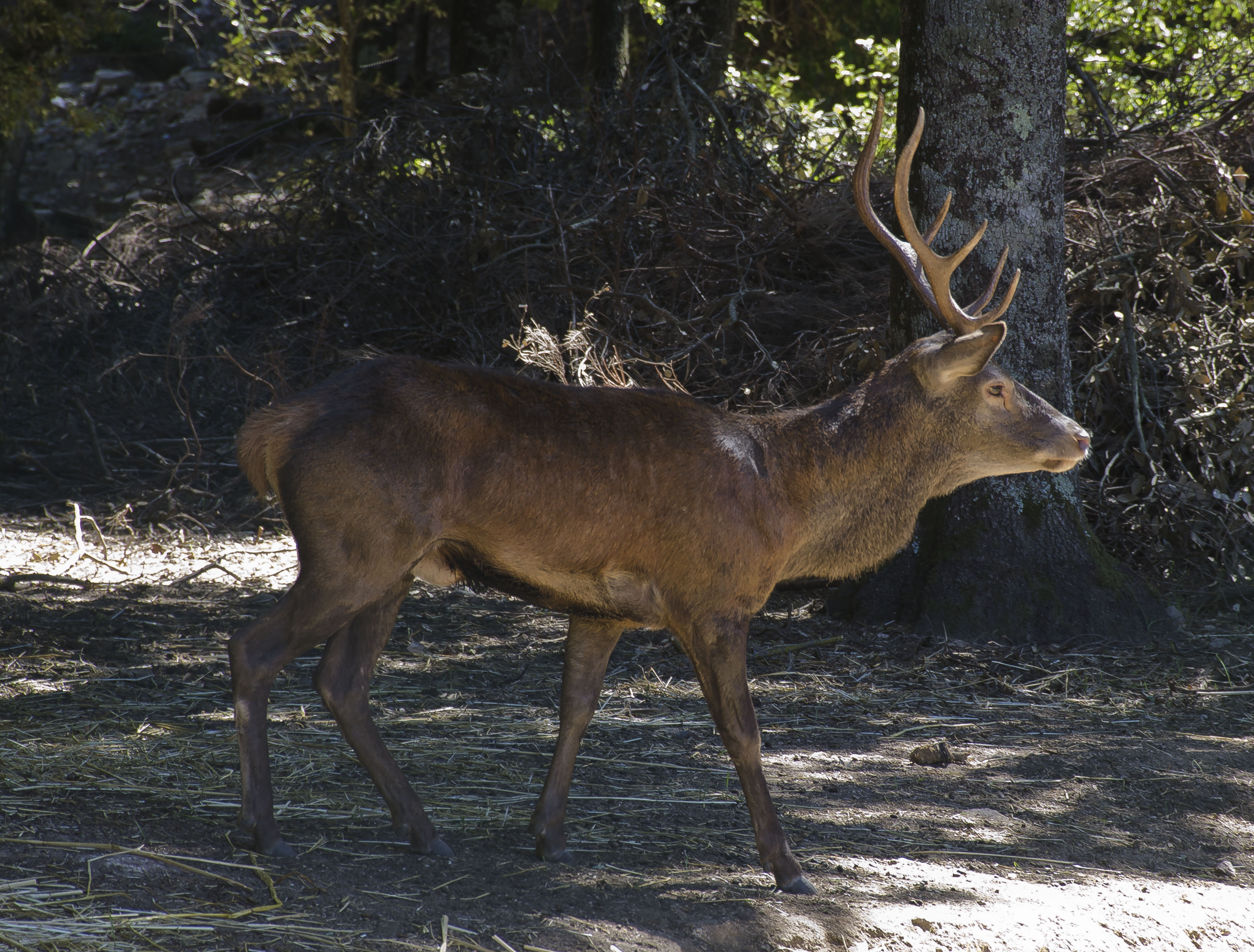 Sardischer Hirsch (Cervus elaphus corsicanus), Parco regionale dei Sette fratelli, Sardinien.